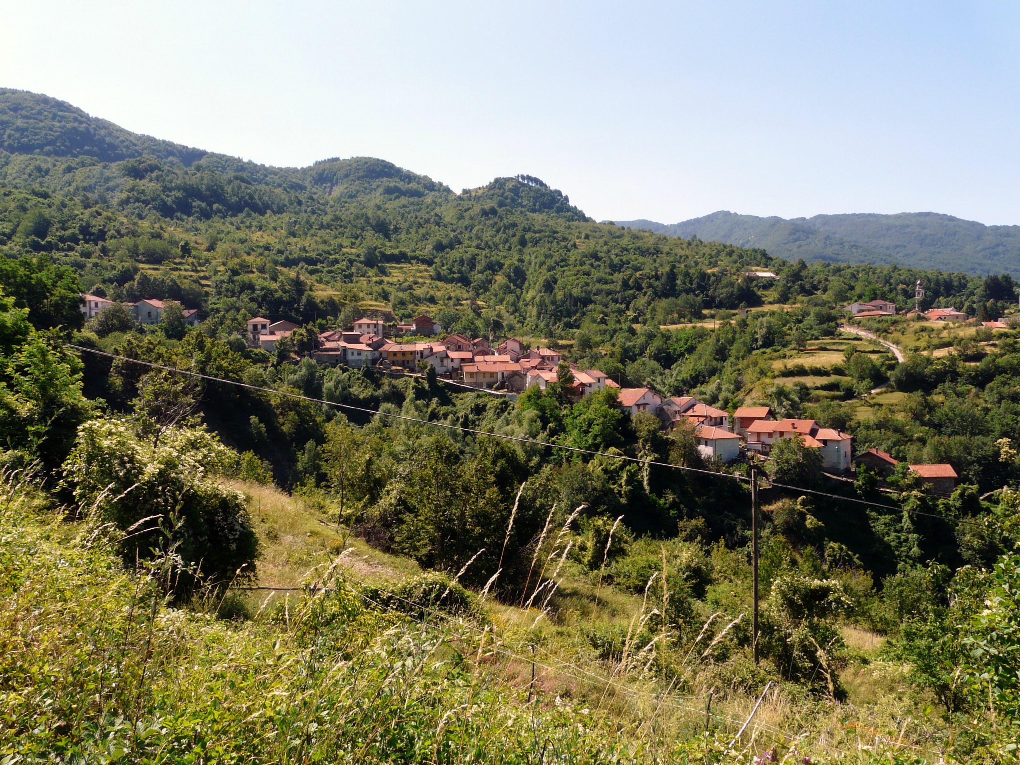 Panorama di Connio, Carrega Ligure, Piemonte, Italia